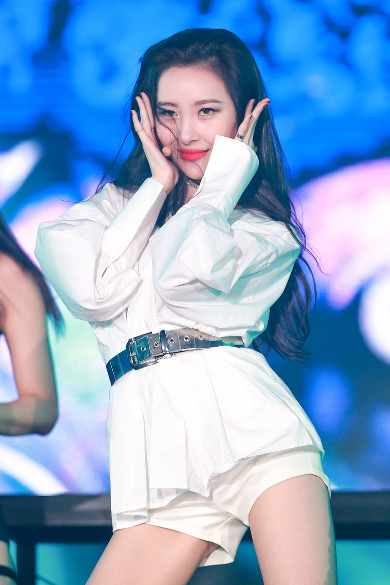 171001 코리아 뮤직 페스티벌 선미